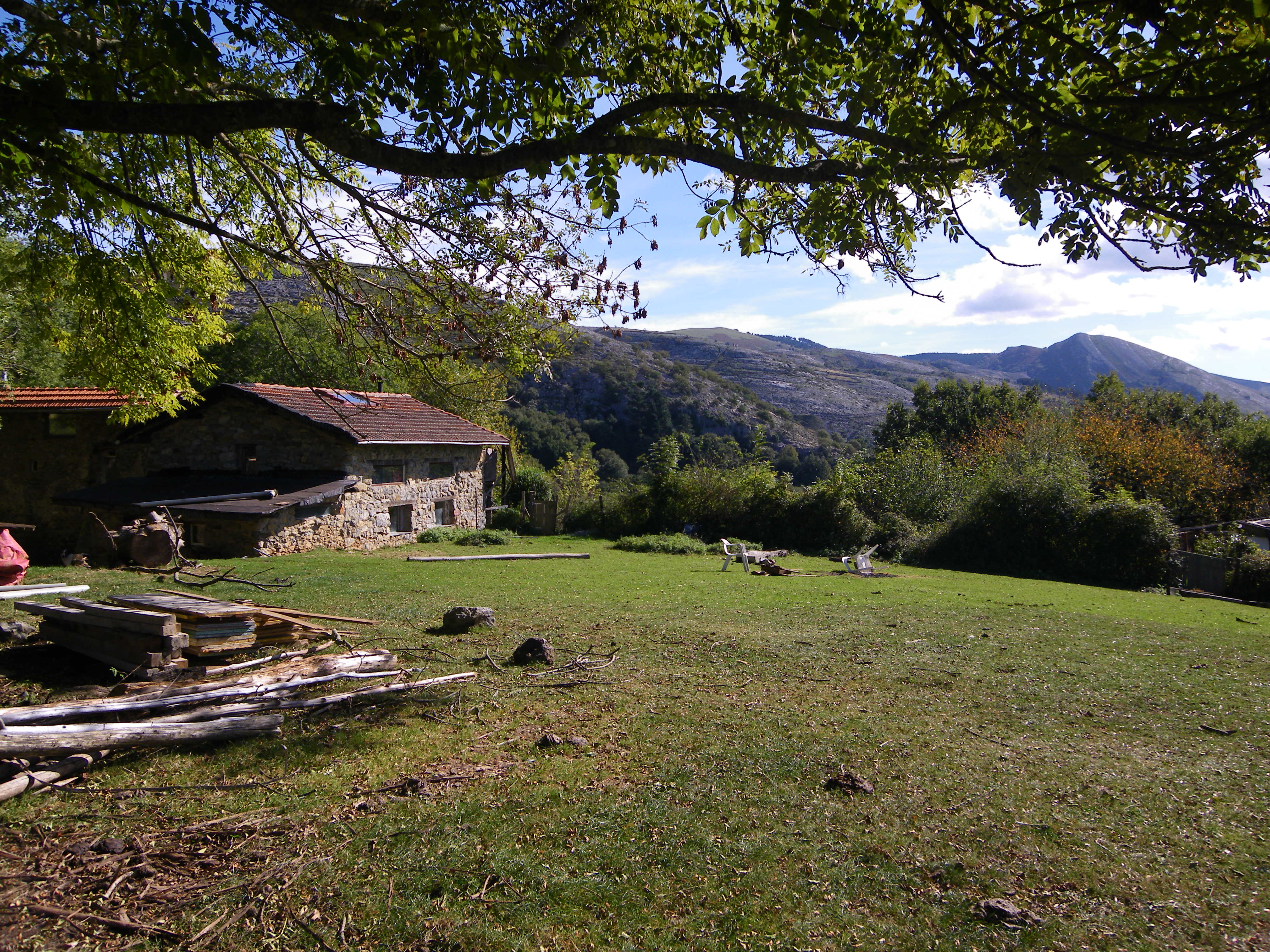 Uraiagako ikuspegia (Galdames, Bizkaiko Enkarterriak).